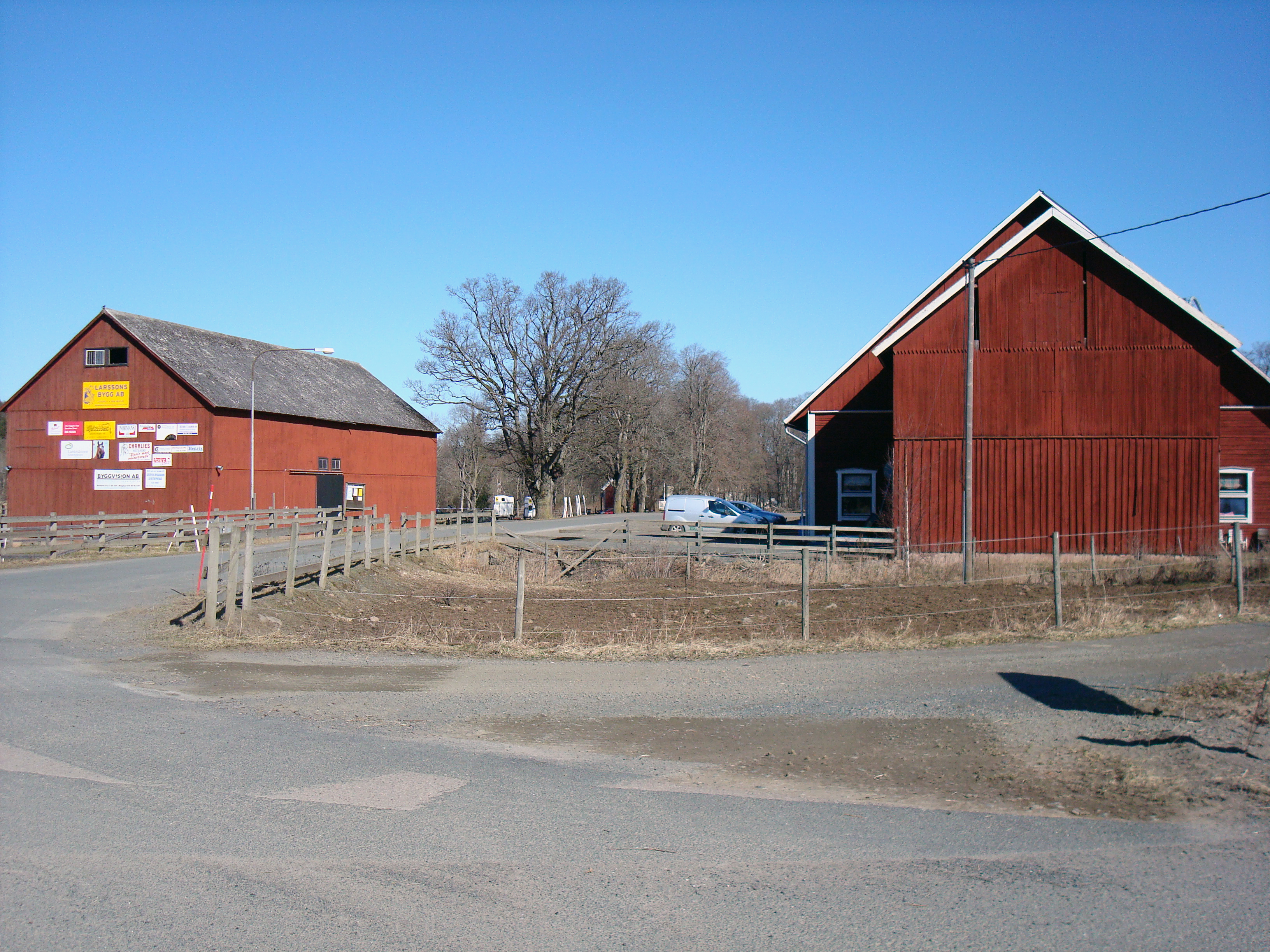 Ridstall i Ramsjöholm, Lekeryd